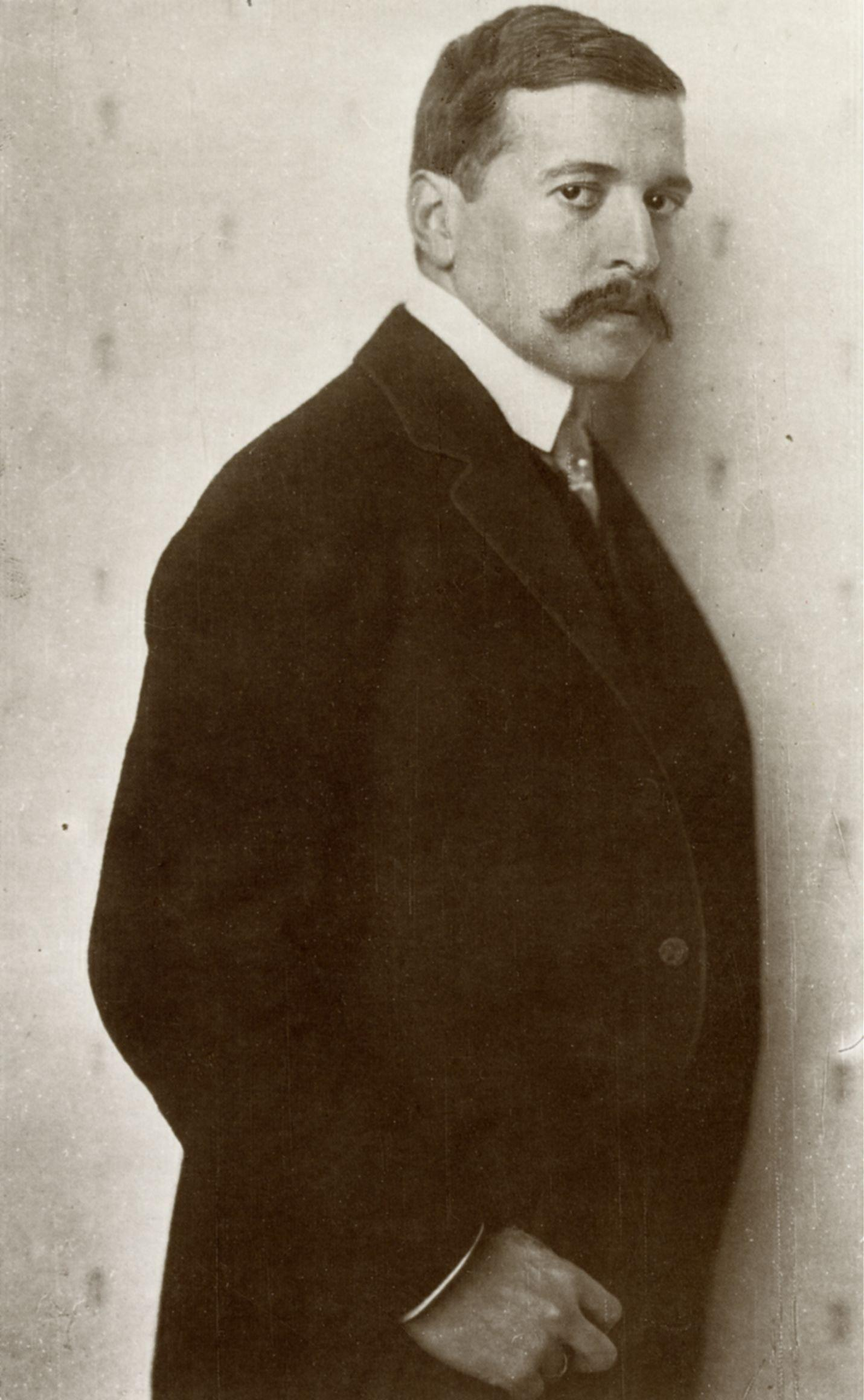 Foto des österreichischen Schriftstellers Hugo von Hofmannsthal von Nicola Perscheid